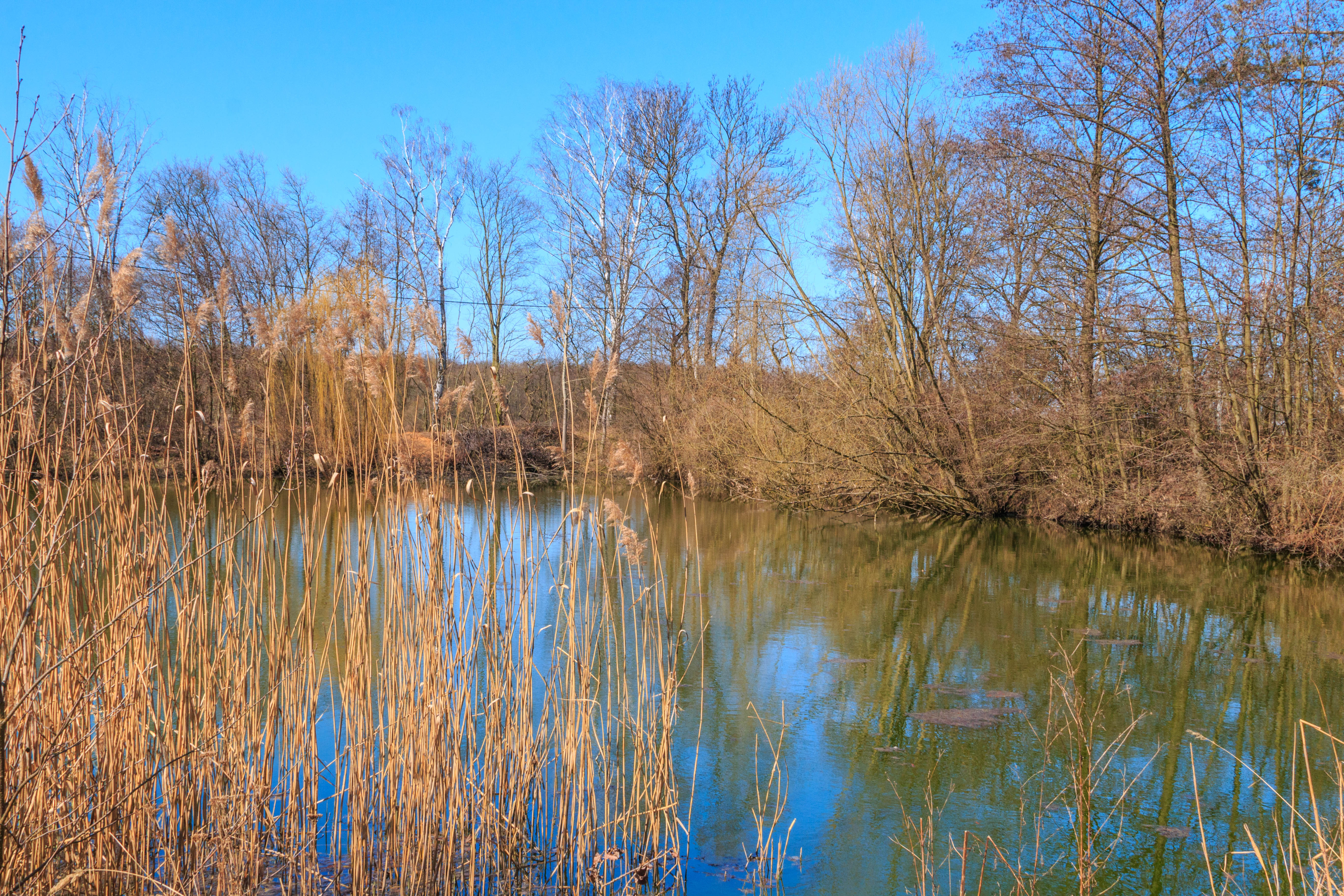 rybníček U Stýskalu v Nechanicích Project: Vodstvo.